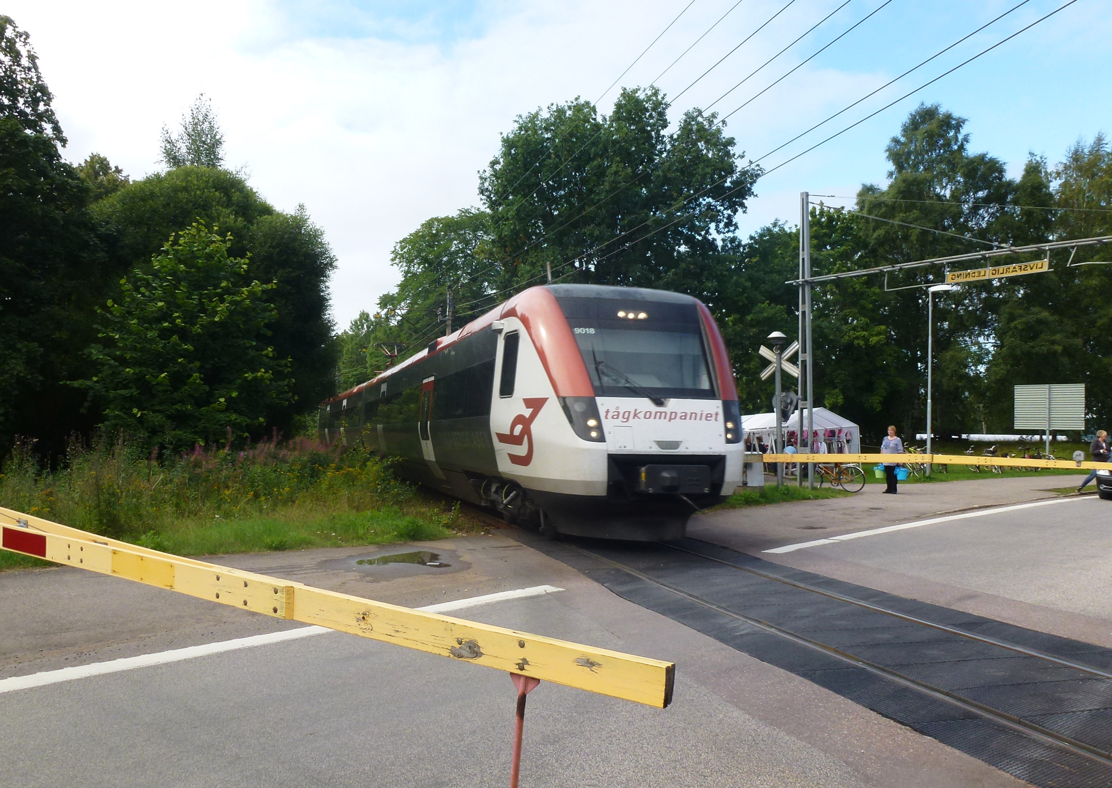 X51, Tåg i Bergslagen i Ludvika